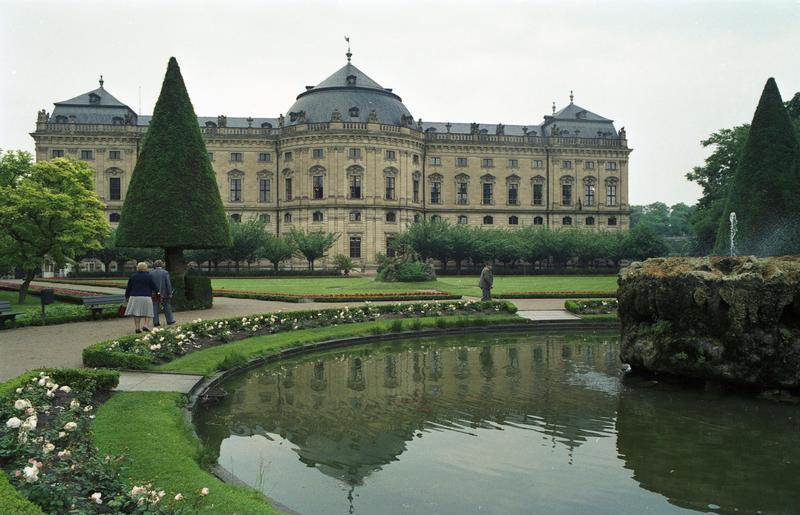 Juni 1988 Würzburg Residenz mit Park